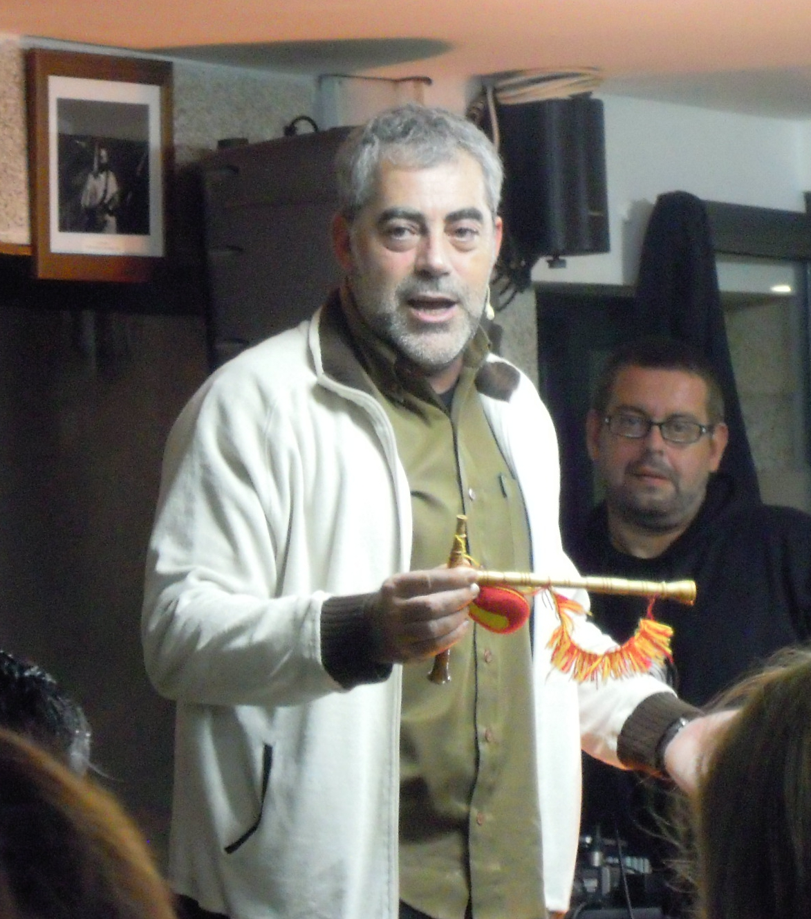 Carlos Blanco, nun monólogo en Moaña